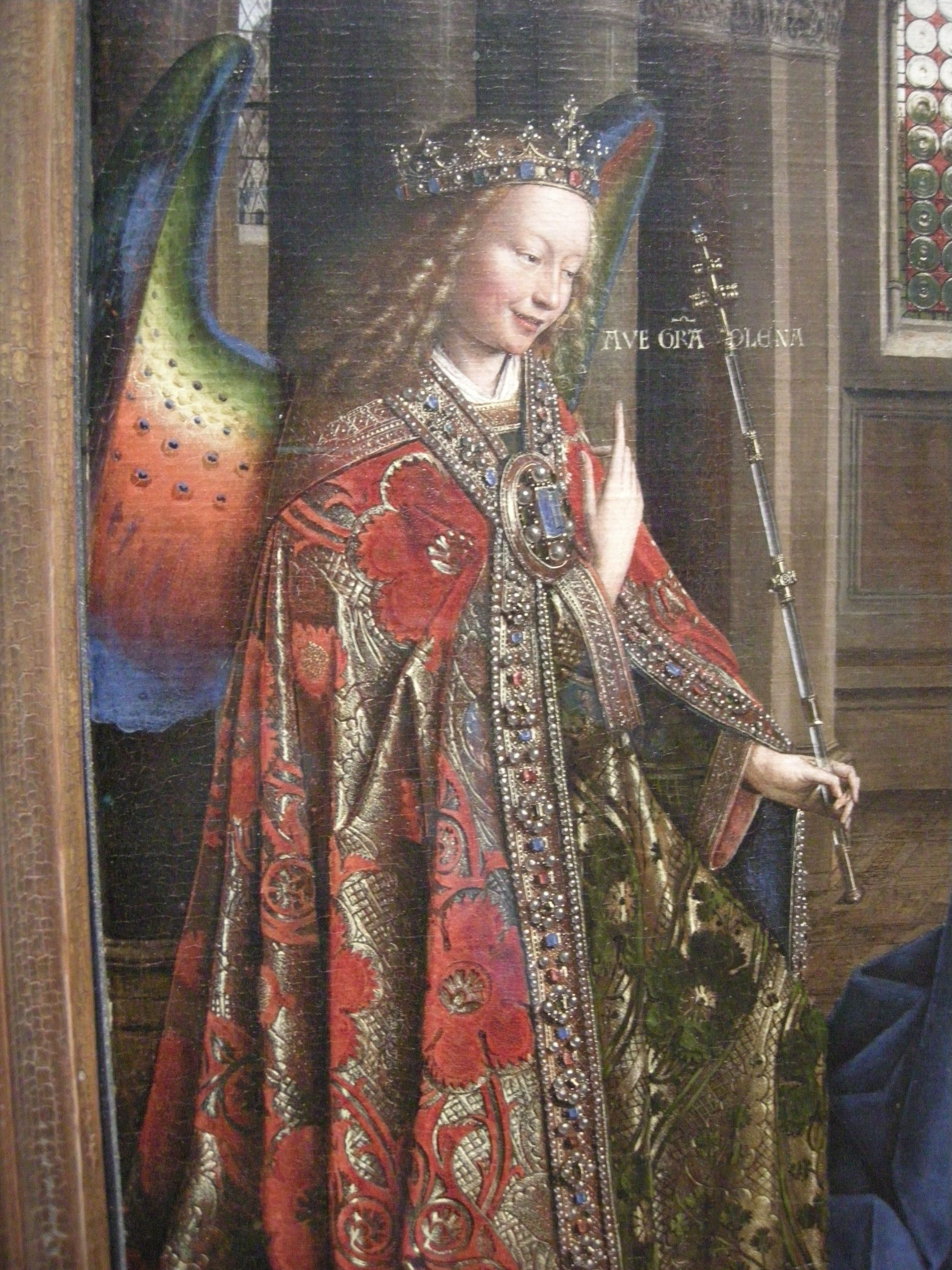 Jan van eyck, annunciazione, dettaglio, 1434-36 circa